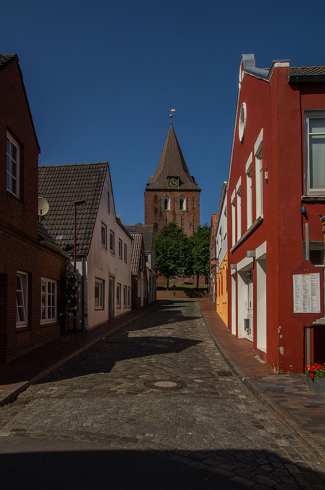 Blick von Süden auf Fischerstraße und Kirchturm